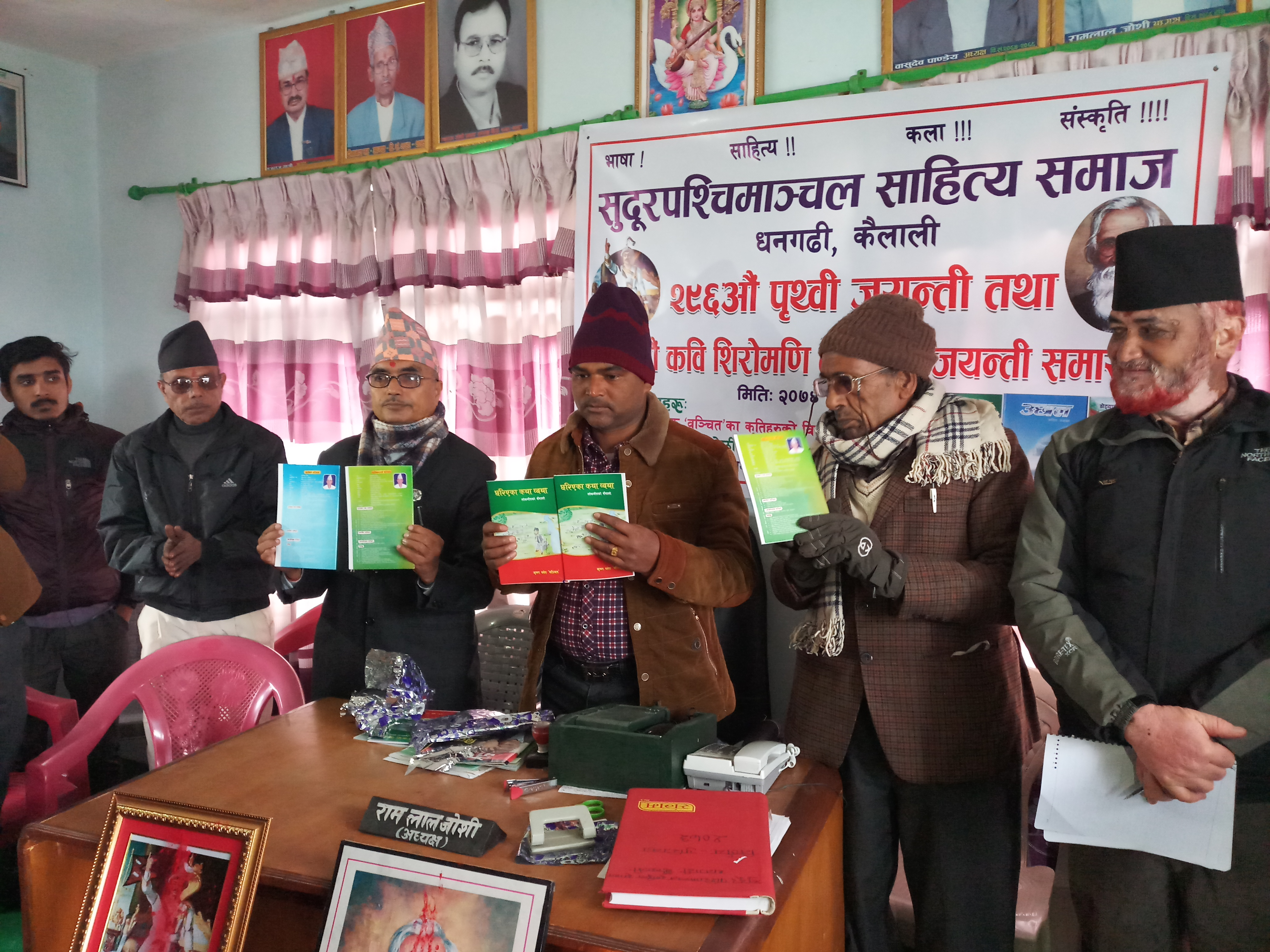 नेपाली: साहित्यकार कृष्ण पनेरु 'बन्चित' तीन ओटा कृतिहरुको विमोचन समारोह धनगढी, कैलाली ।